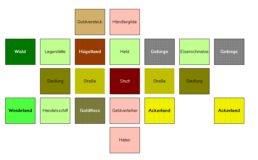 Schematischer Aufbau der Fürsten von Catan - Erweiterung Zeit des Goldes